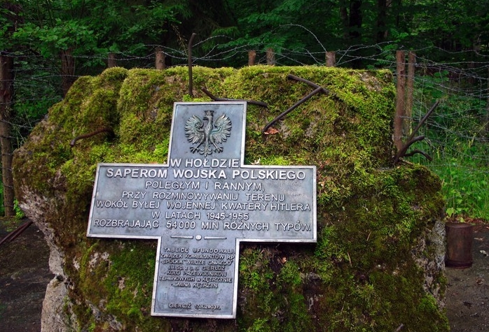 Gierłoż, woj. warmińsko-mazurskie, powiat kętrzyński, gmina Kętrzyn - Wilczy Szaniec